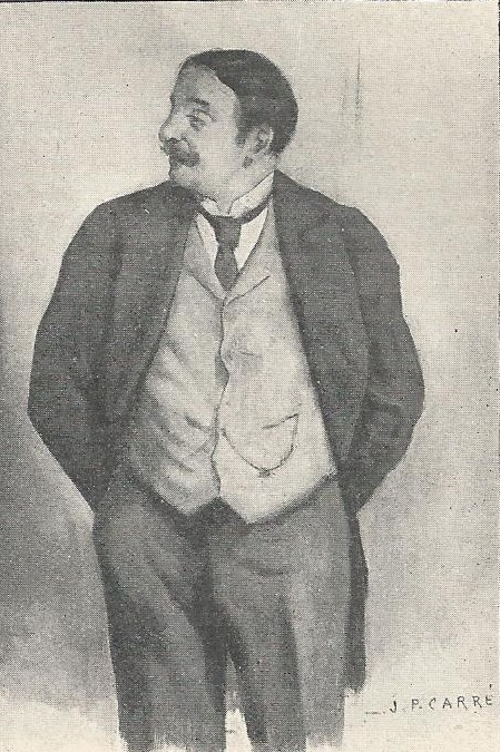 Illustration du "Foyer", comédie d'Octave Mirbeau, par J.-P. Carré. Éditions Arthème Fayard, collection « Modern-Théâtre », s. d. [1913]